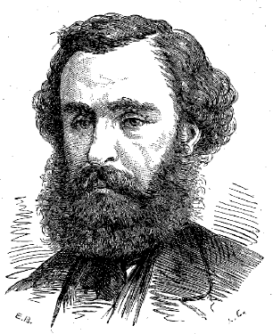 Joseph Croce-Spinelli